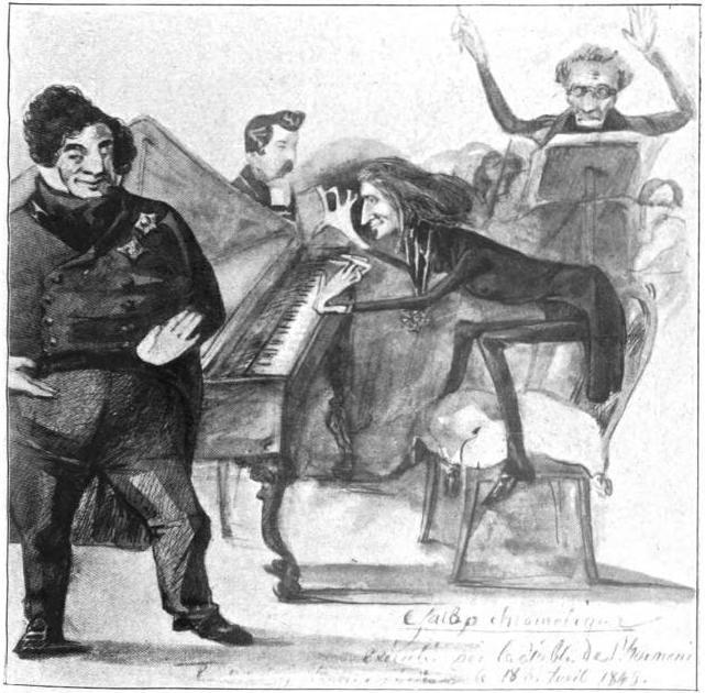 Le "Galop chromatique exécuté par le diable de l'harmonie". Caricature anonyme. Liszt au piano, derrière lui au pupitre, François-Antoine Habeneck et au premier plan, le chanteur Luigi Lablache.